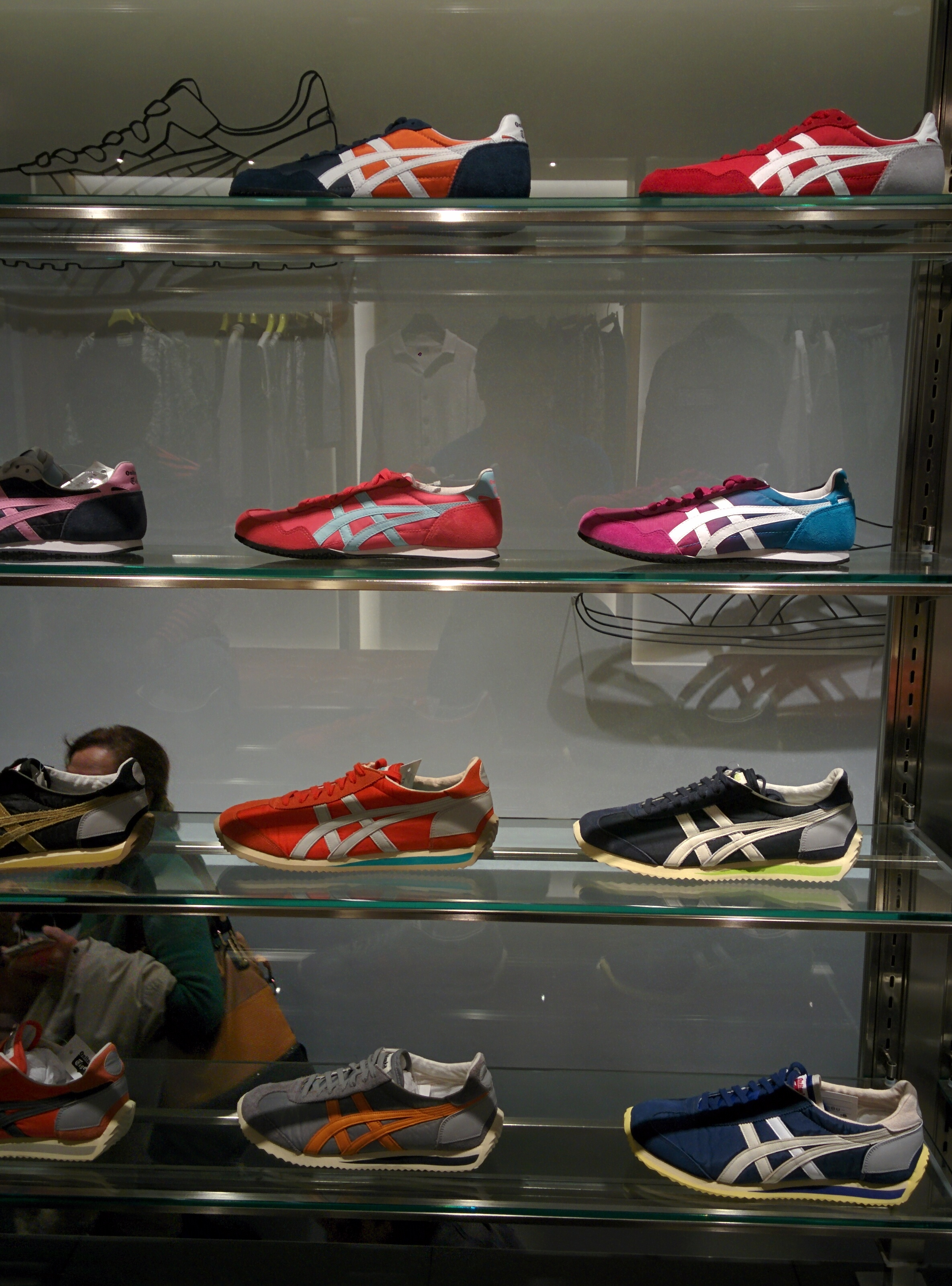 Onitsuka Tiger shop